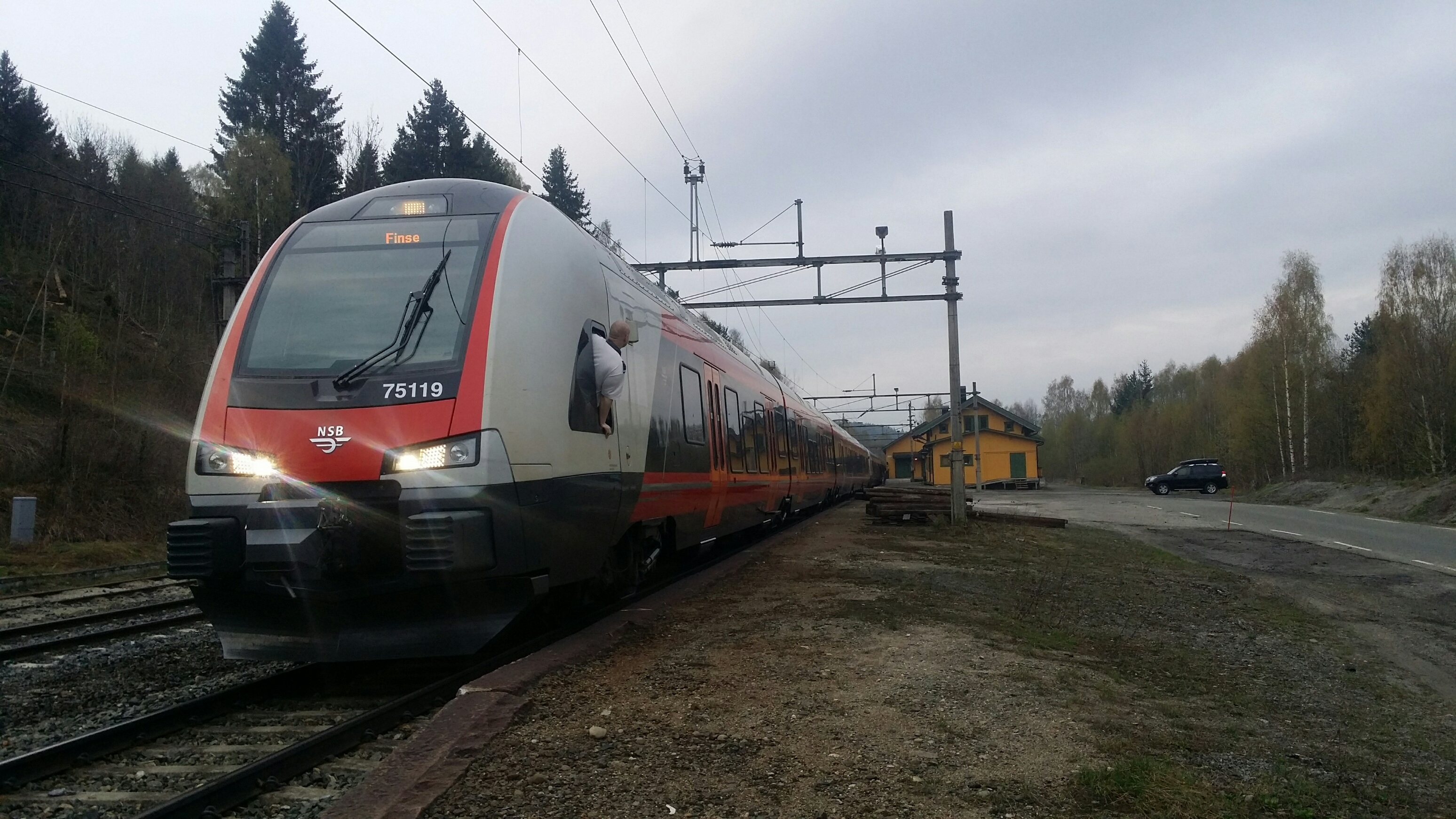 Et ekstratog har stoppet ved stasjonen.